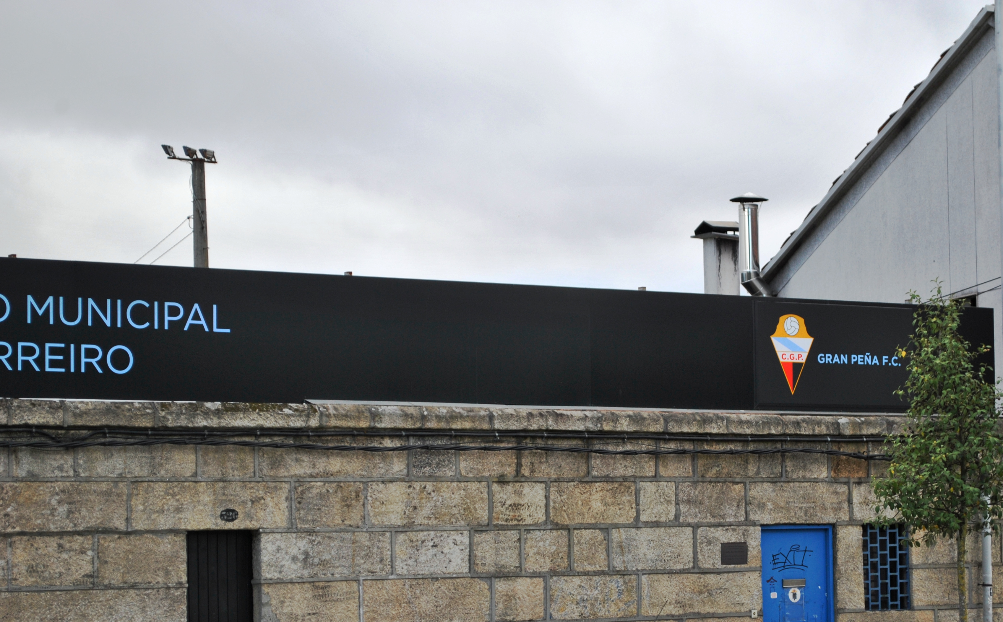 Véxase o título e as categorías